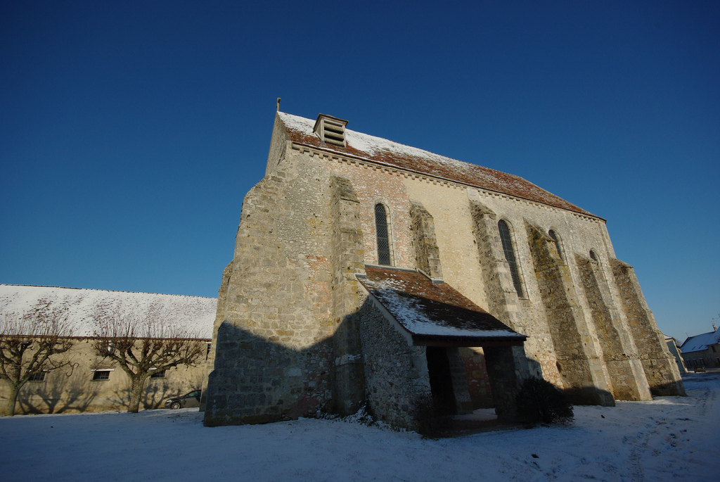 Sous la neige, magnifique église à Cerneux